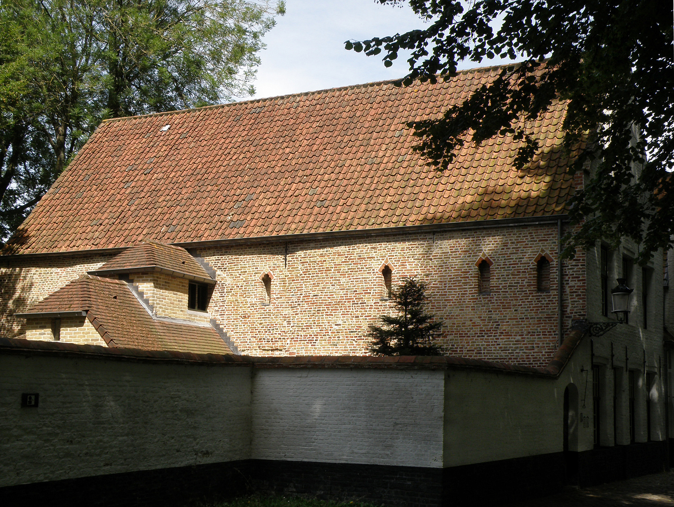 Brugge, Begijnhof. Begijnenhuis nr. 6 (noordzijde van het middenplein). Zijgevel met kaarsnissen.